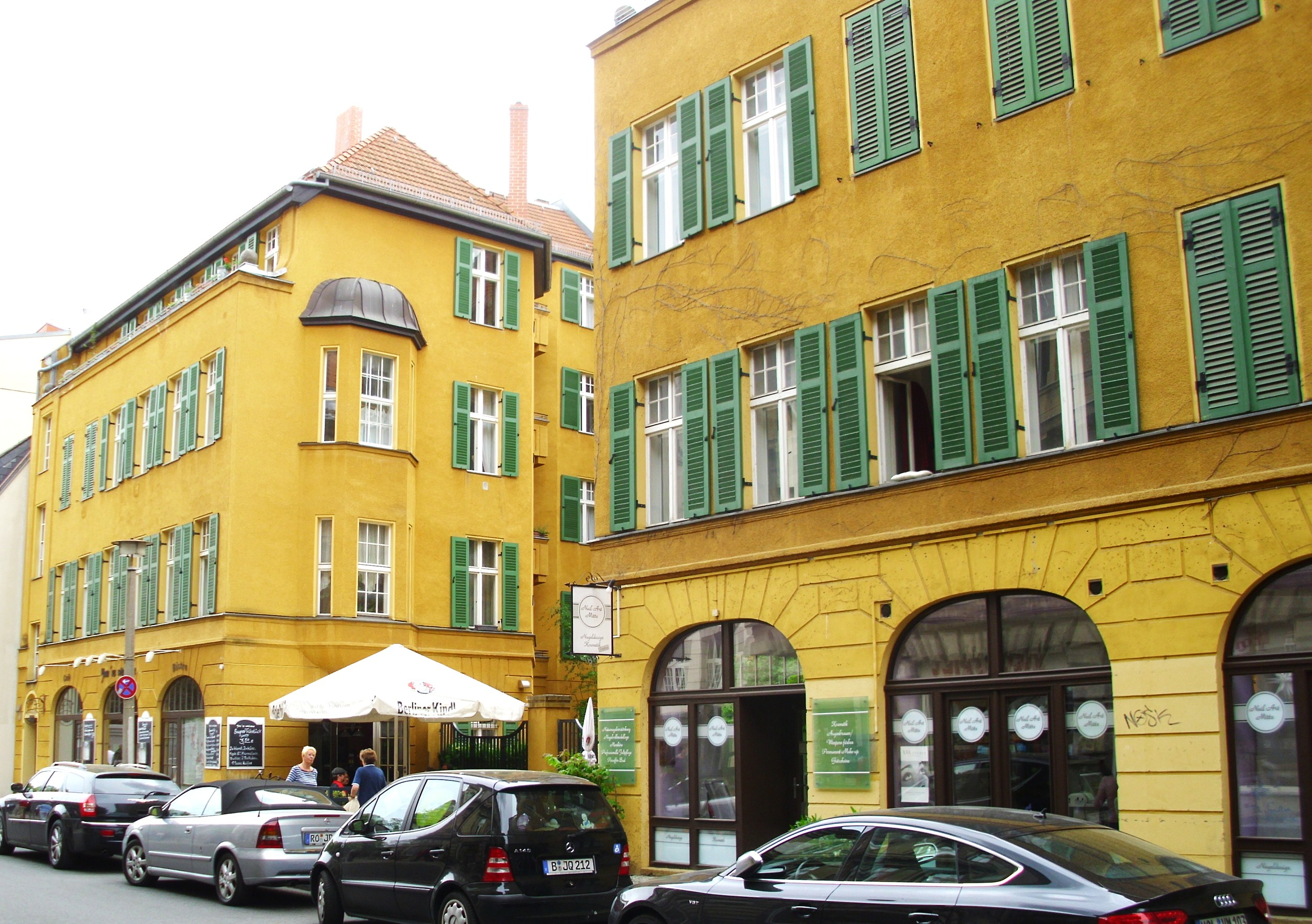 Wohnhaus Große Hamburger Straße 15-16 im denkmalgeschützten Ensemble der Spandauer Vorstadt, erbaut 1911